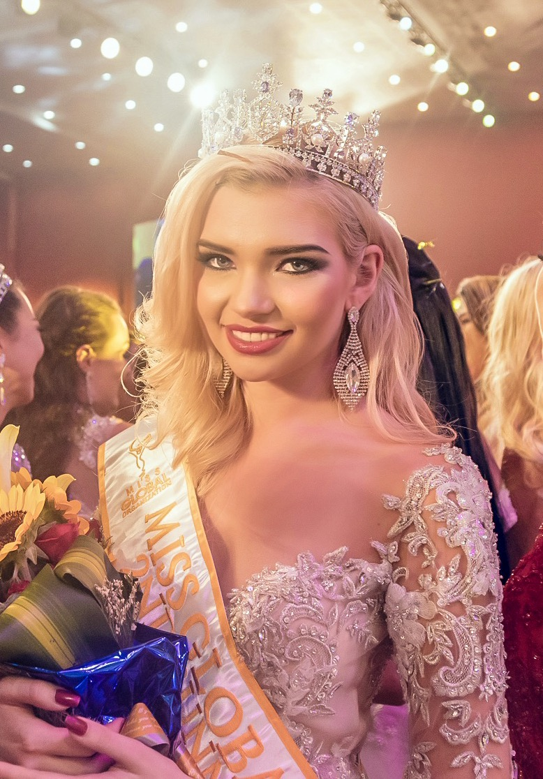 Selina Kriechbaum 2nd Runner Up Miss Global 2017, Miss Germany, Miss Global Germany